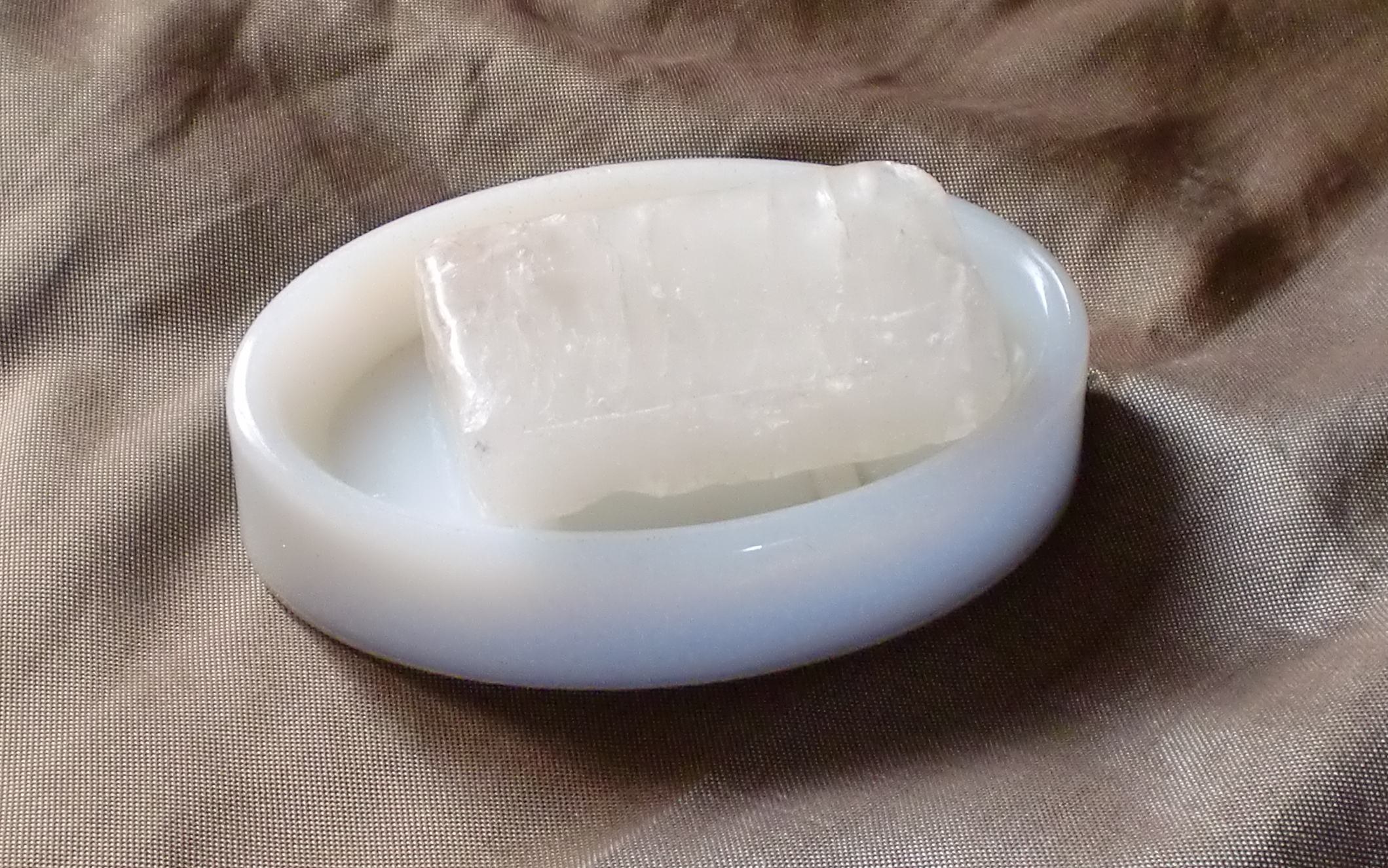 Piedra de alumbre en una base de cerámica (industria argentina). Utilizada en la peluquería tradicional para hombres. Se aplicaba después del afeitado.